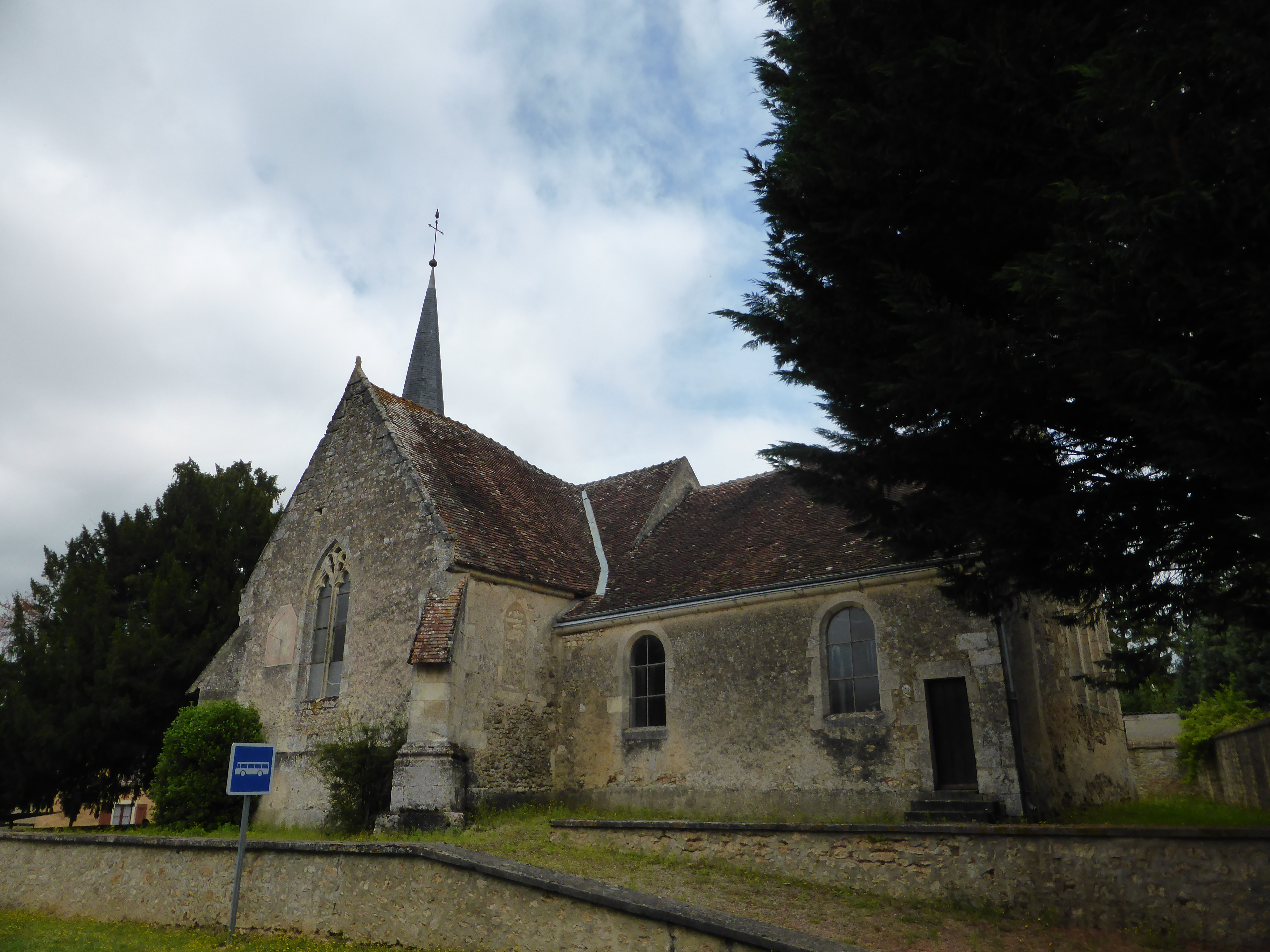 Église de Saint-Fulgent-des-Ormes, dans l'Orne.